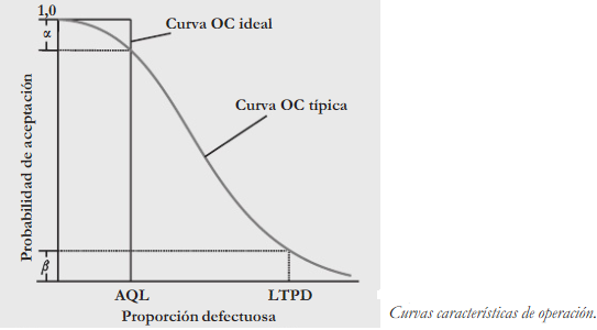 Muestreo de Asignación